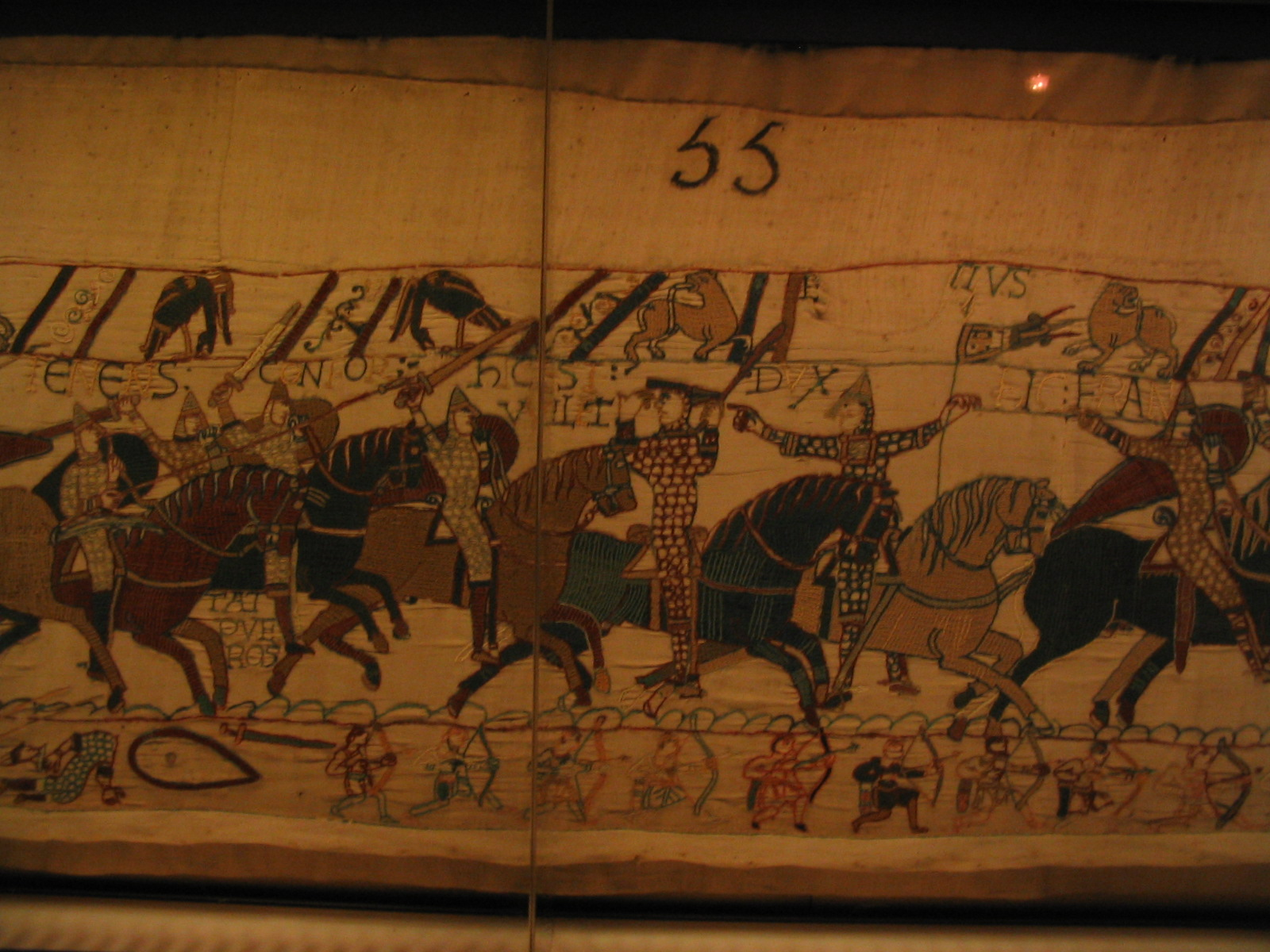 Bayeux Tapestry fragment